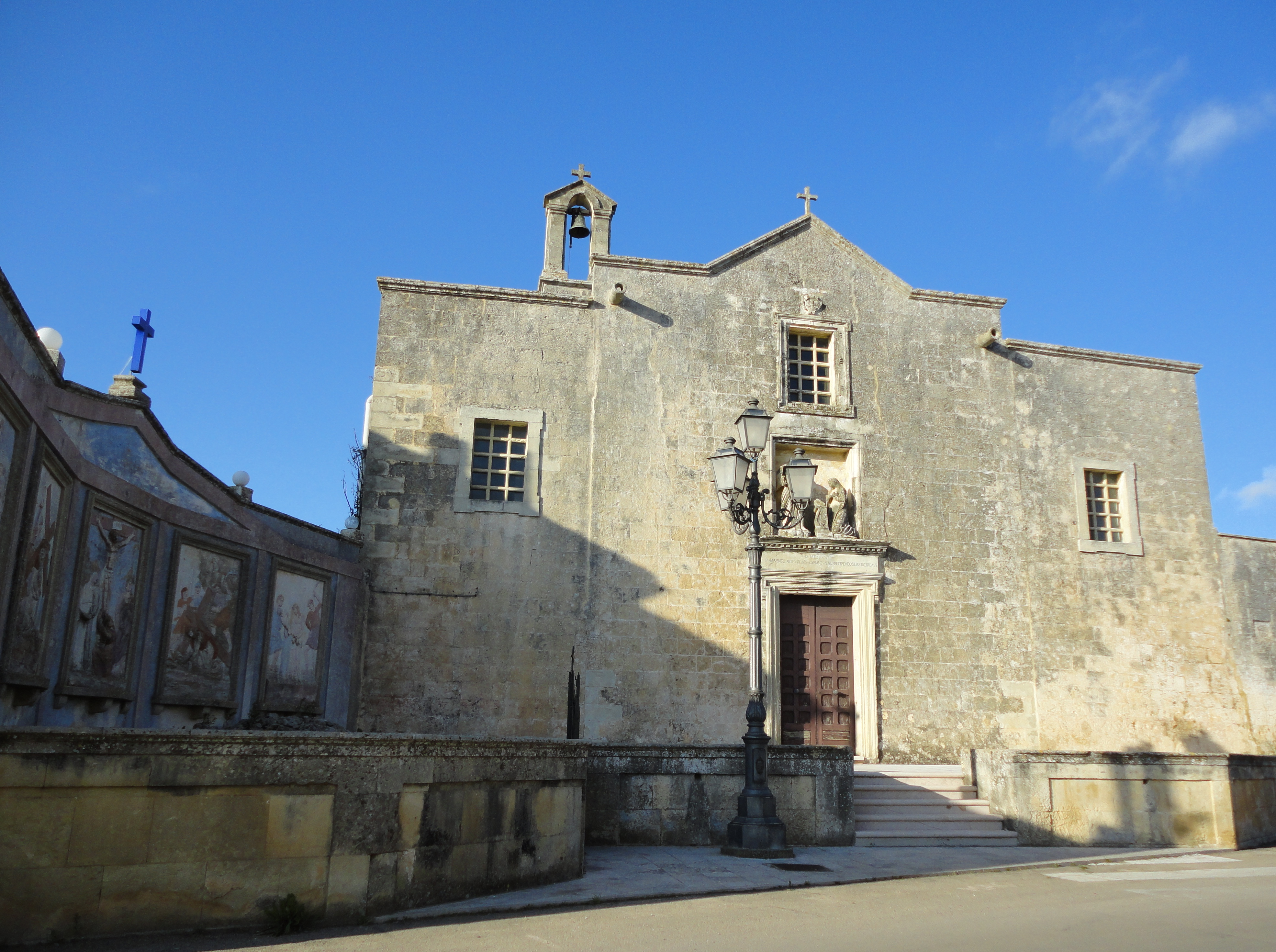 Chiesa dell'Annunziata Sanarica, Lecce